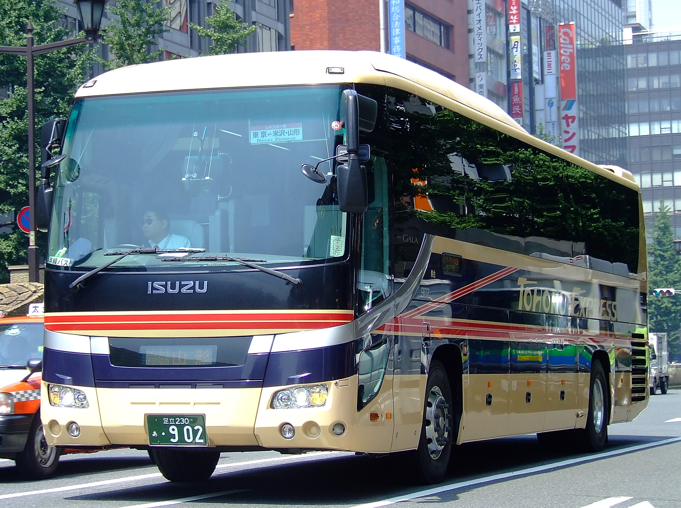 東北急行バスの高速バス「レインボー号」 東京駅前にて